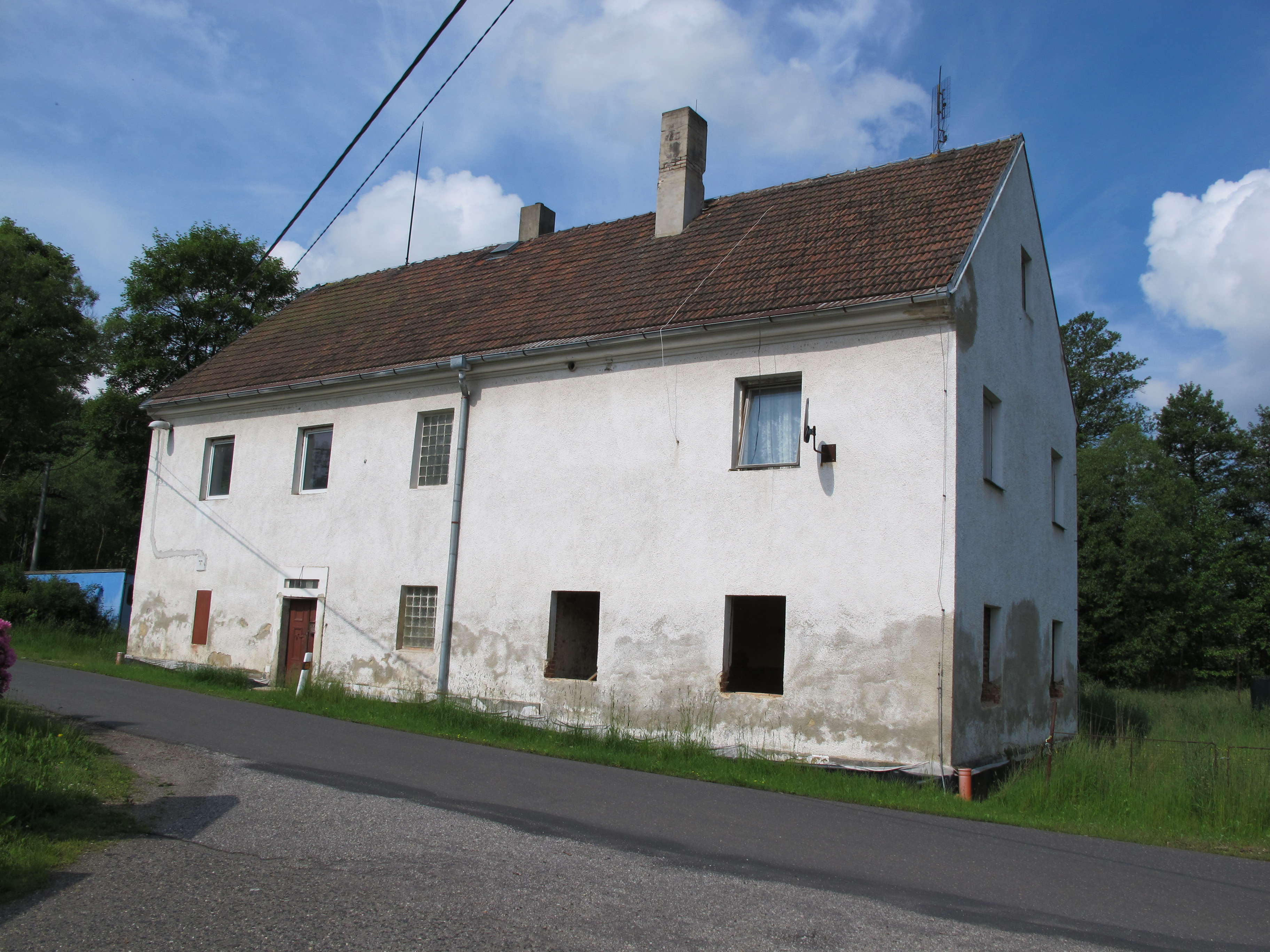 Horní Žandov, okres Cheb - čp. 59. This image was acquired during the event Wikiměsto Mariánské Lázně.